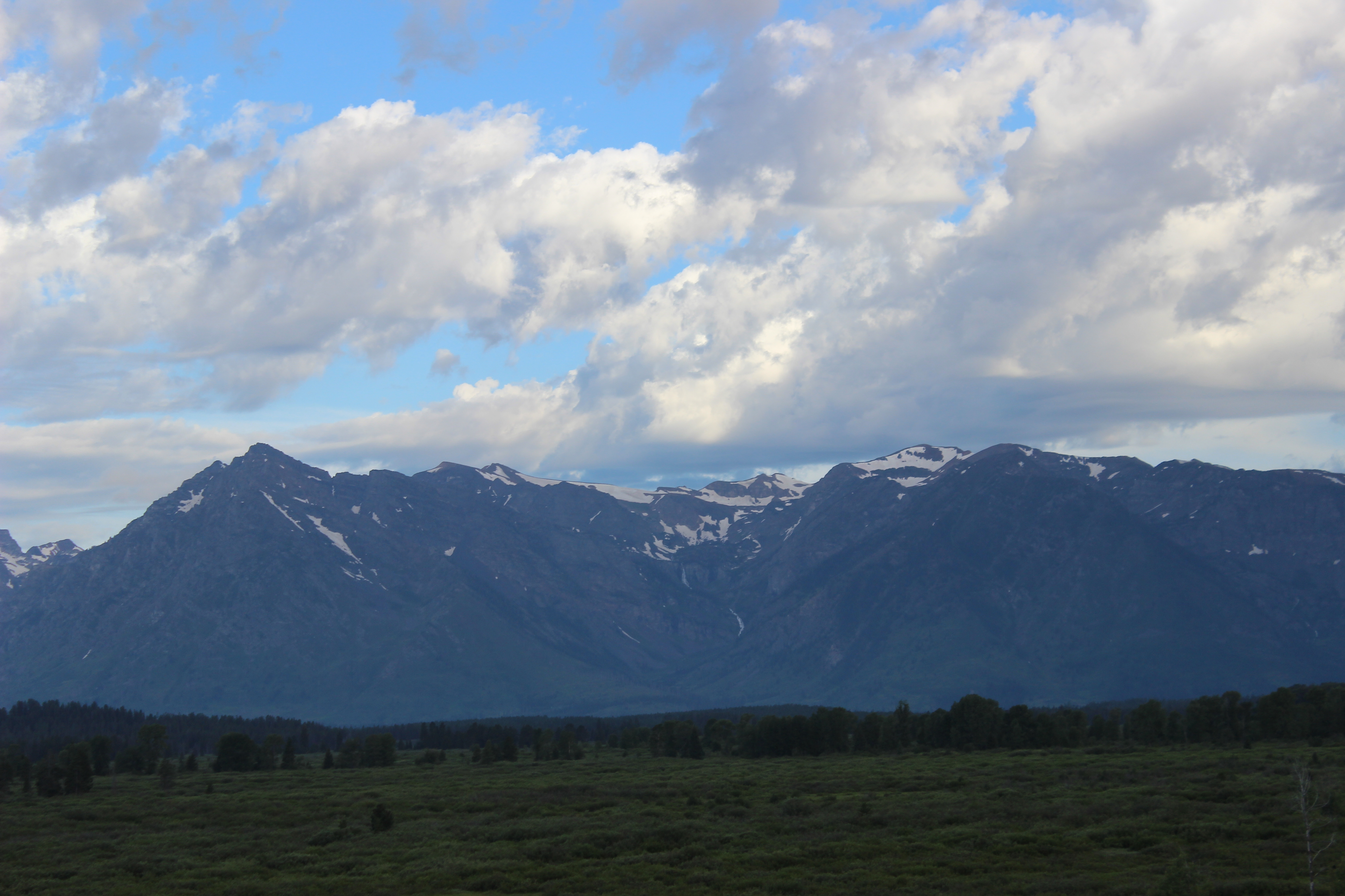 Teton Range desde el Jackson Lake Lodge.